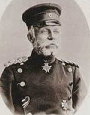 Portretfoto van Generaal der Infanterie Rudolph Otto von Budritzki